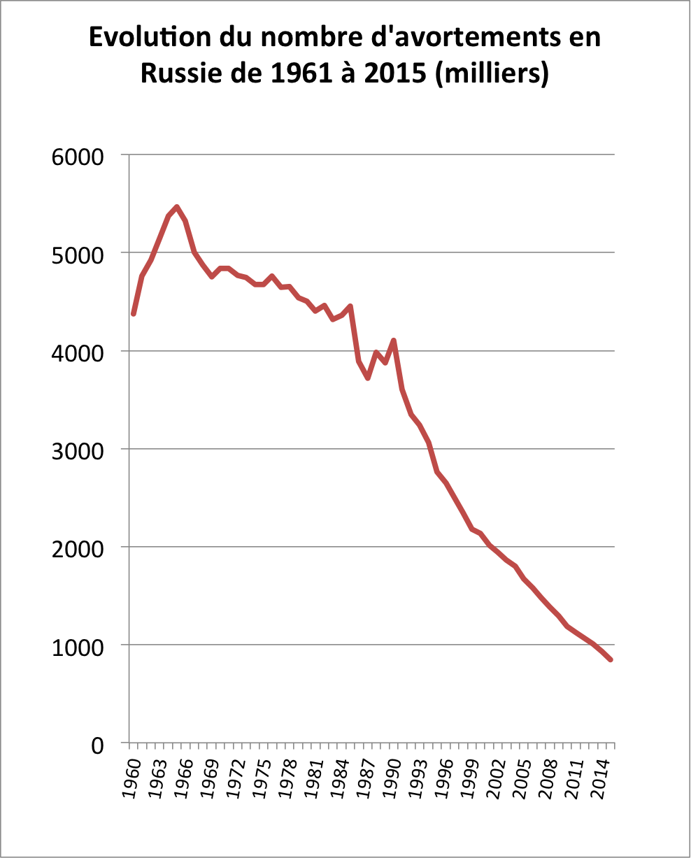 Evolution du nombre d'avortements en Russie 1960 - 2015 Source Rosstat (Service fédéral des statistiques)